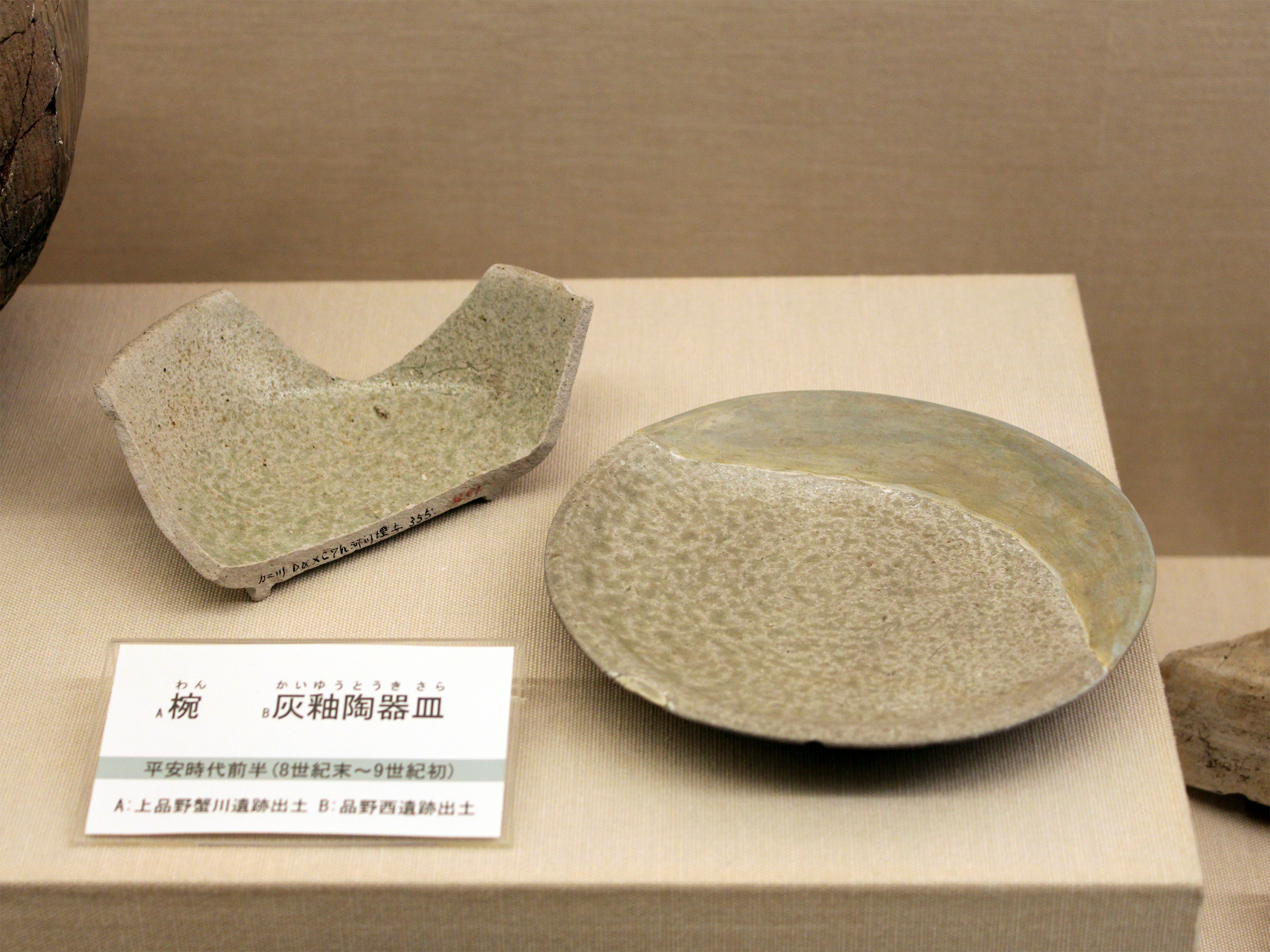 瀬戸窯産の灰釉陶器碗（左）・皿（右）。瀬戸蔵ミュージアム蔵。